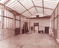 Imatge de les infrastructures de la productora cinematogràfica Boreal Films.